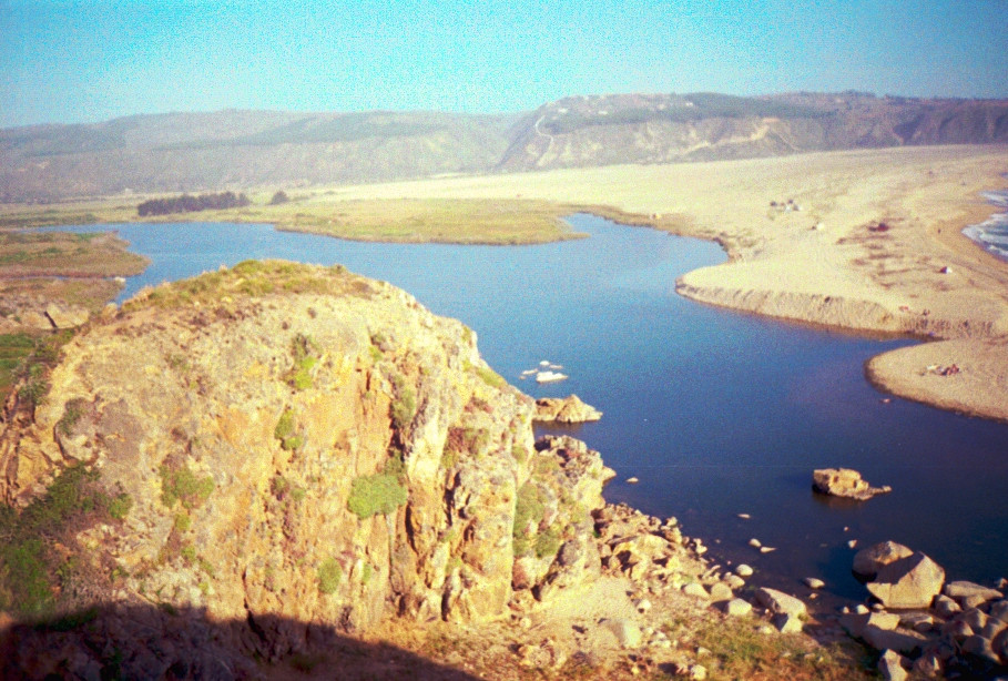 Humedal de Tunquen en el que habia una Hacienda Jesuitica en el Siglo XVII